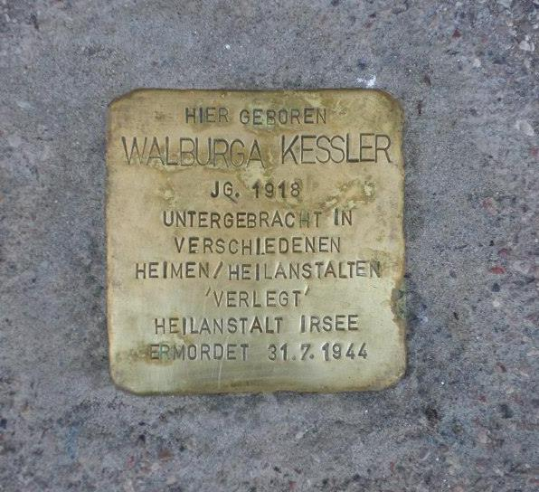 Stolperstein Walburga Kessler in Burgberg (Allgäu) - Recherche und Bild von Matt Kessler, Urgroßneffe